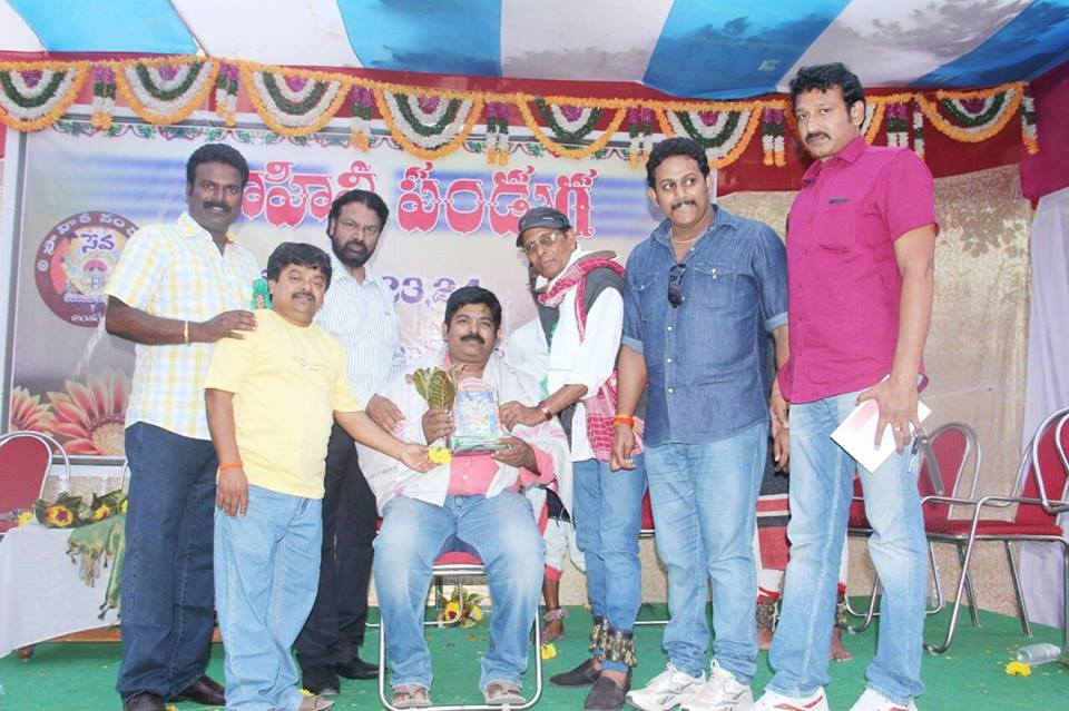 సాహితీ మిత్రలతో